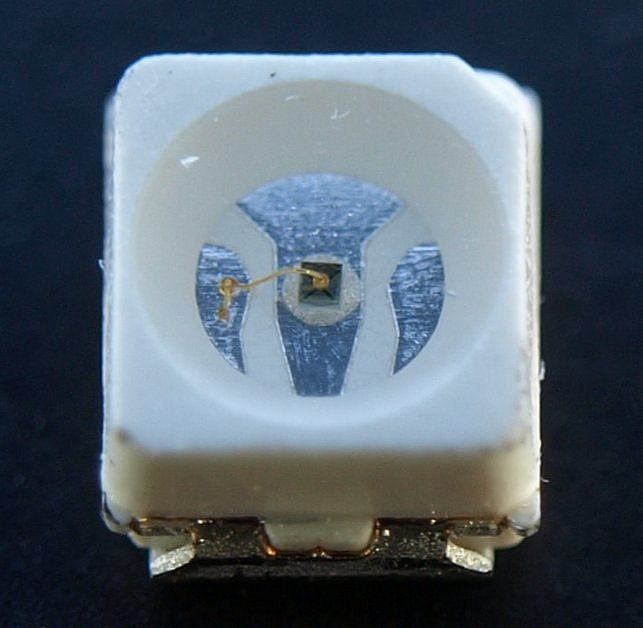 LED in SMD-Bauweise